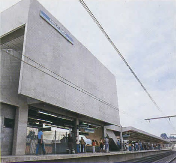 Vista da estação Itapevi.